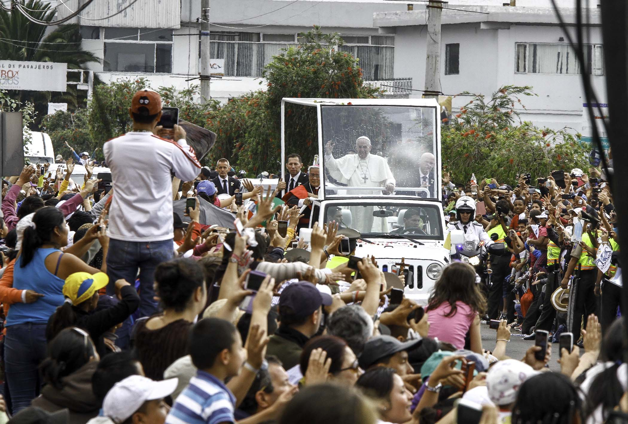 Quito, 07 jul (Andes).- Fieles católicos y comerciantes se agolpan en el parque Bicentenario para escuchar la misa y recibir las bendiciones del papa Francisco. ANDES/Micaela Ayala V.